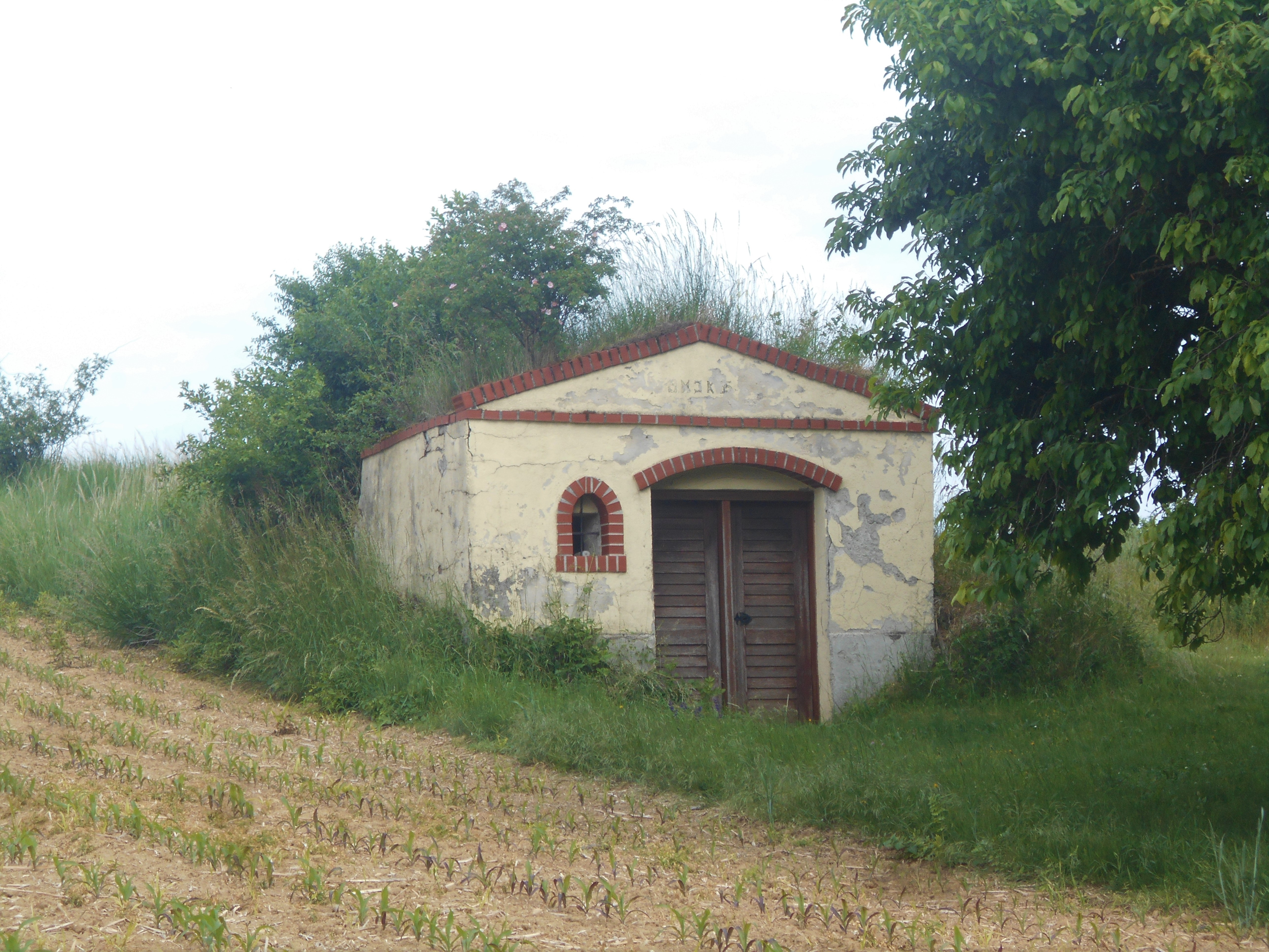 Weinkeller in der Forsthausstraße in Hornsburg, Gem. Kreuttal